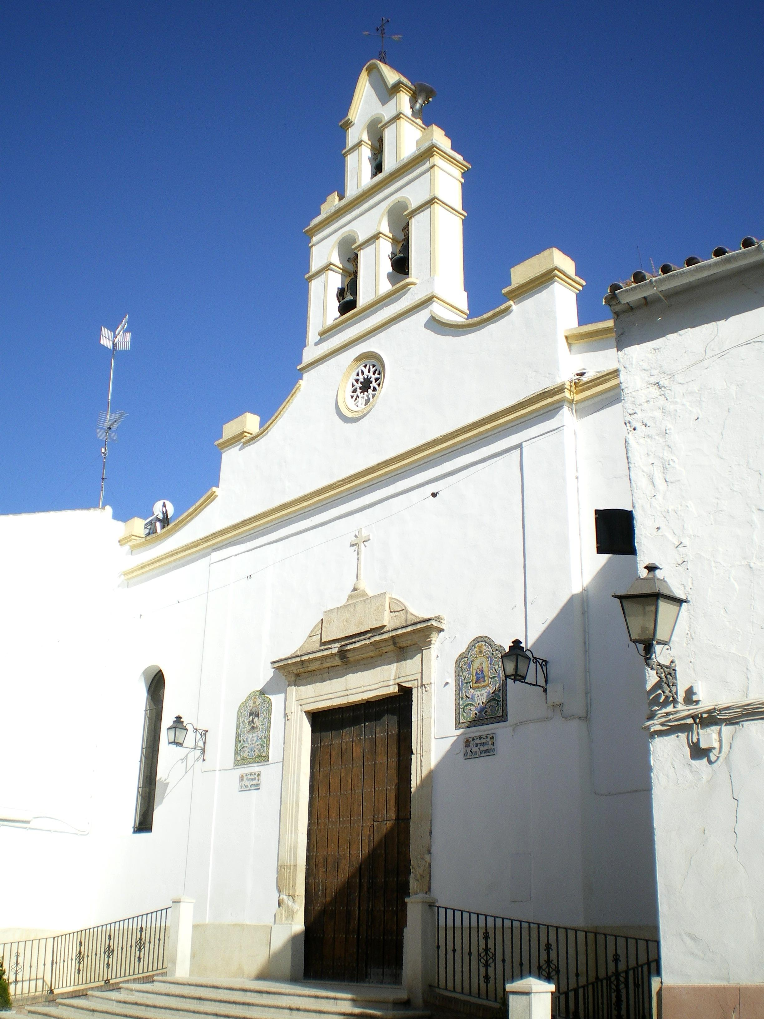 Aragonés: A ilésia de Moriles, consagrata á l'alvocacion de San Cheromo (San Jerónimo), d'a primera metat d'o sieglo XX.